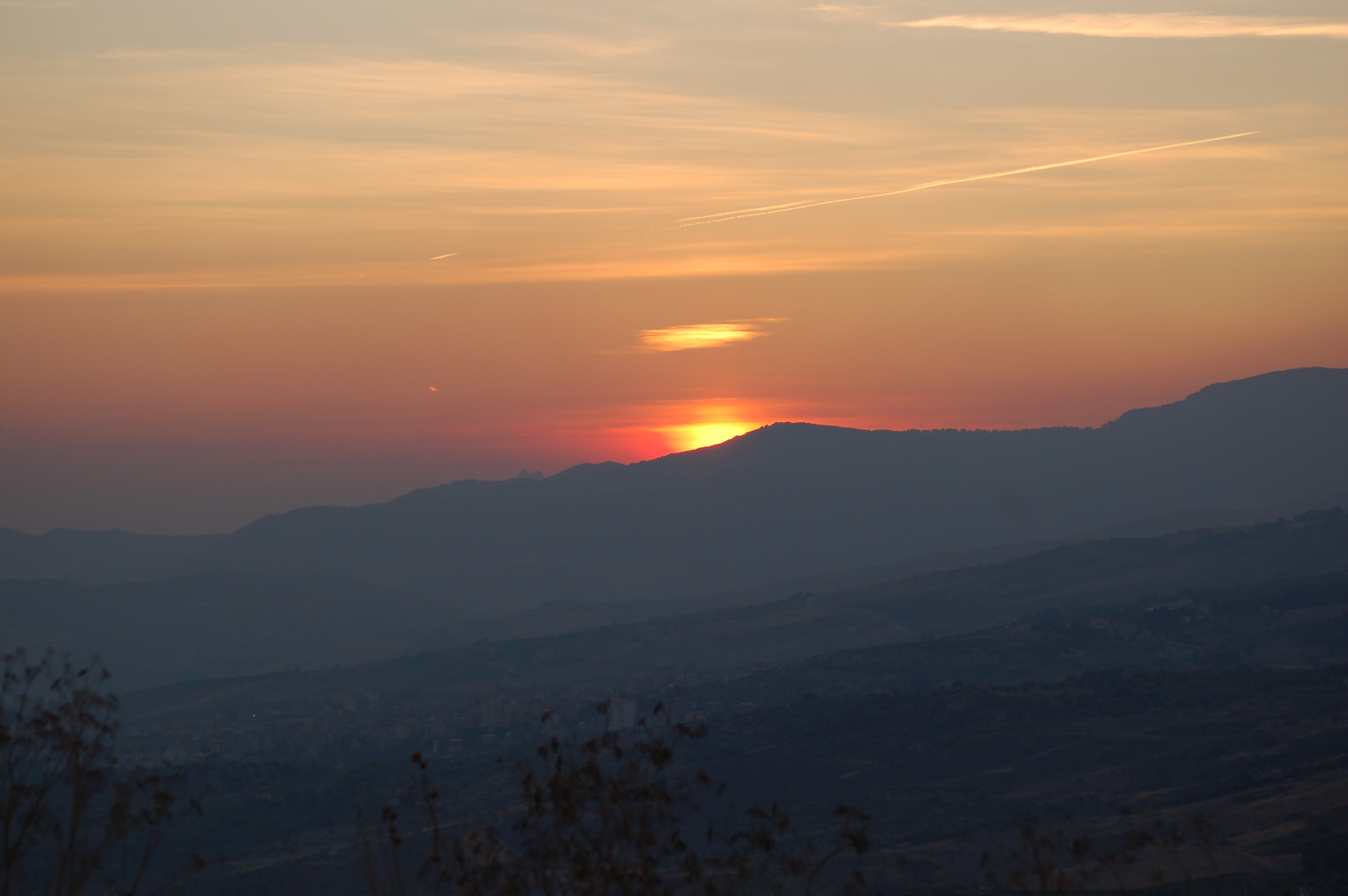 Tramonto su Bivona